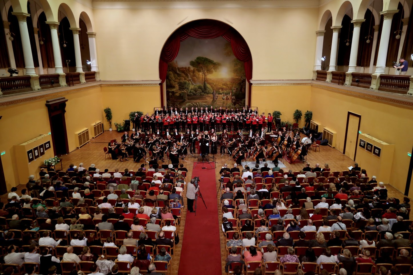 Budapesti Olasz Kultúrintézet díszterme